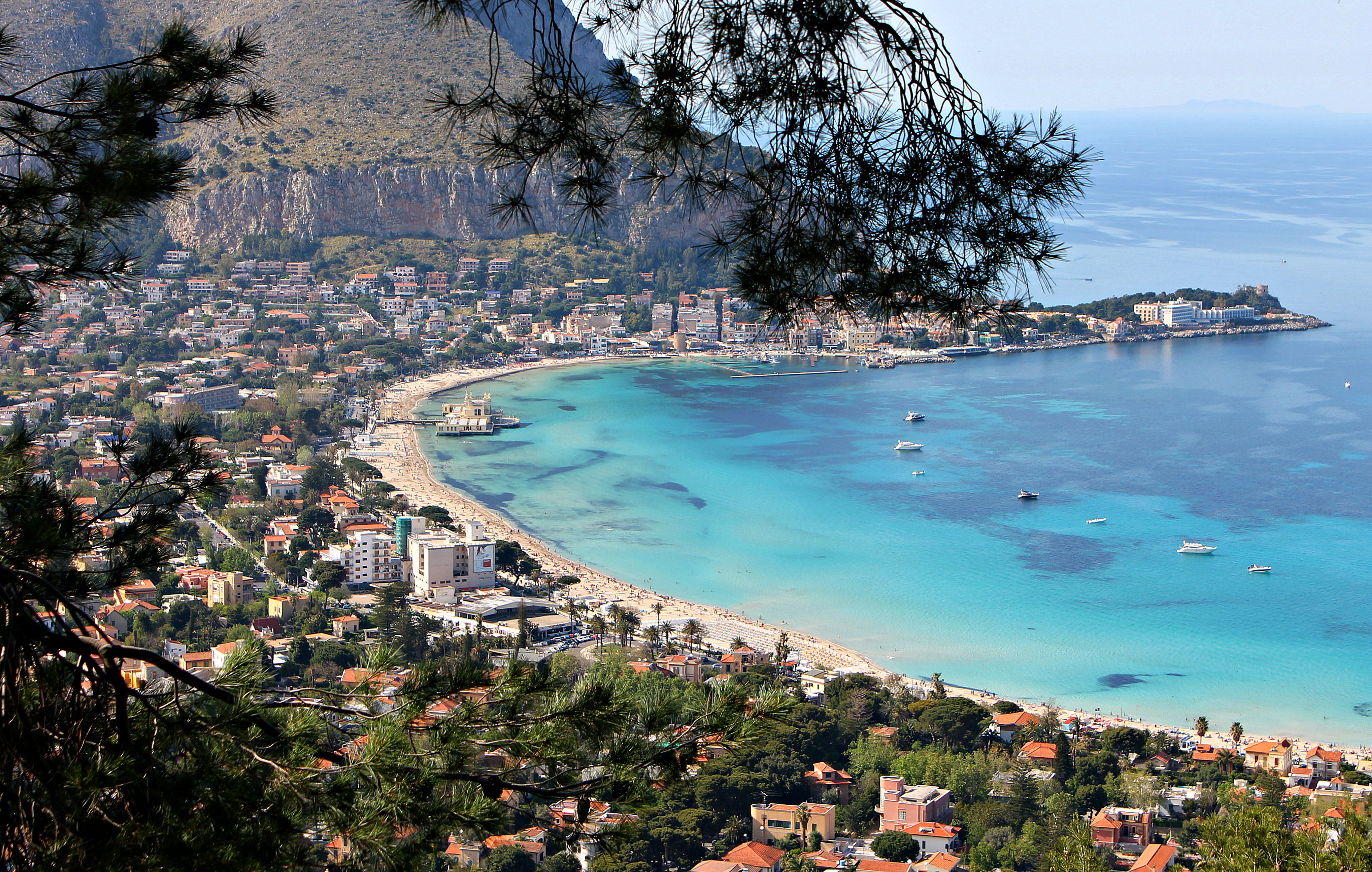 Palermo: il meraviglioso golfo di Mondello visto da Monte Pellegrino (strada che conduce al Santuario di Santa Rosalia...)